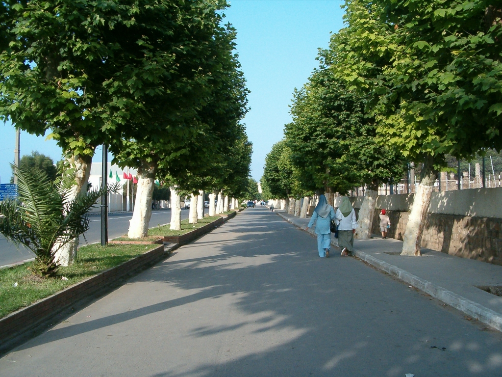 Chemin menant vers le quartier populaire de Tizirine à Cherchell (Algérie).